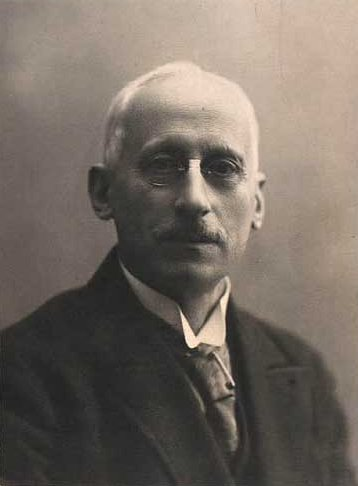 Ove Krak (1862-1923), dansk læge og vejviserudgiver, grundlægger af Kraks Blå Bog